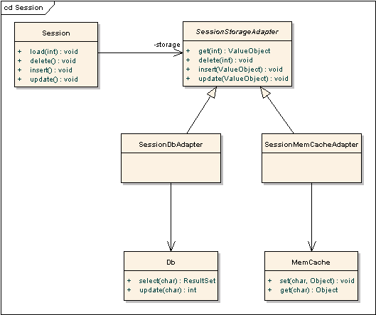 Diagrama de classe que demostra o uso da pattern adapter. Por meio da interface SessionStorageAdapter a classe Session pode utilizar diferentes dispositívos de armazenagem sem a necessidade de conhece-los, evitando assim, o uso de estruturas de controle tais como if, else ou switch.